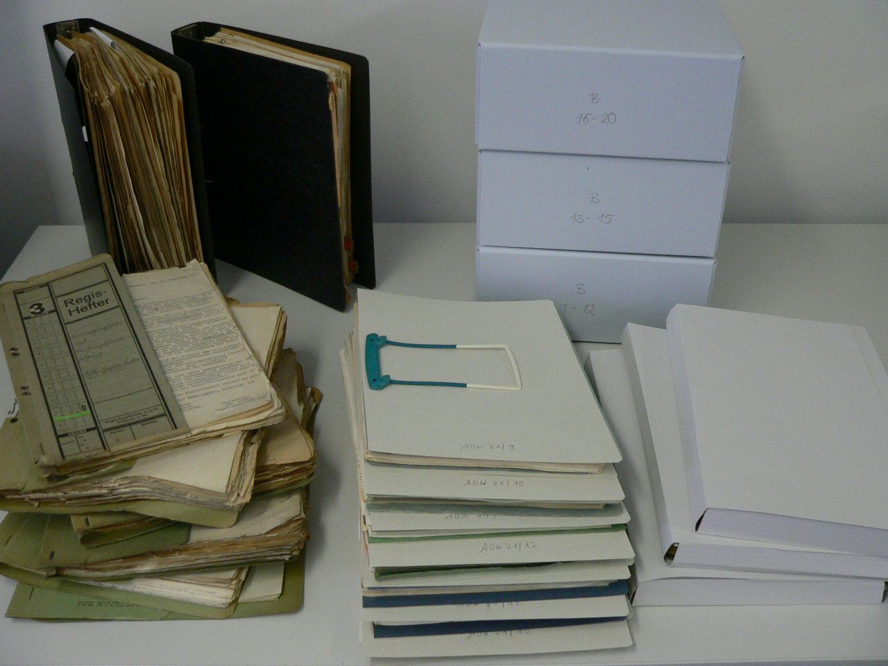 Vergleich von Archivgut vor und nach der Entsäuerung